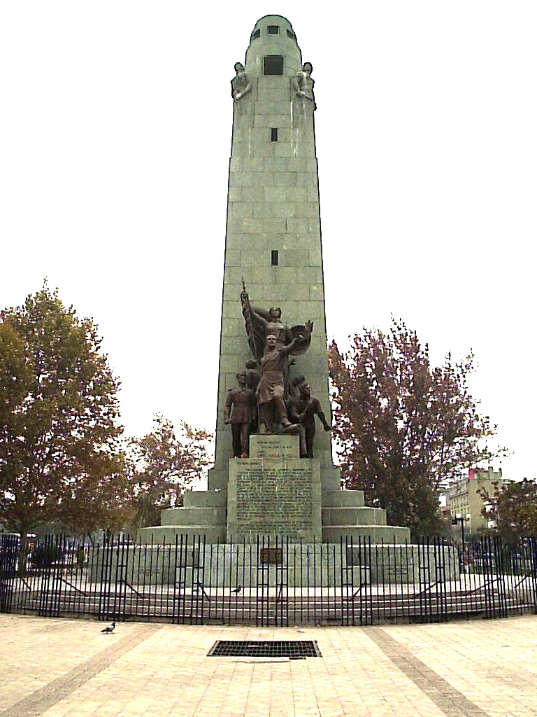 Monumento a Arturo Prat en Santiago de Chile Autor:Alstradiaan Alstradiaan Blog Fecha:Abril de 2005 Fotografía tomada con una cámara digital Olympus camedia D-395 de 3.2 megapixeles